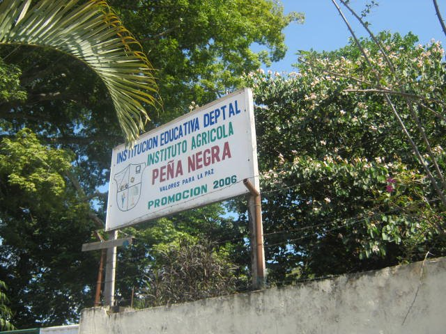 Entrada del instituto agricola.